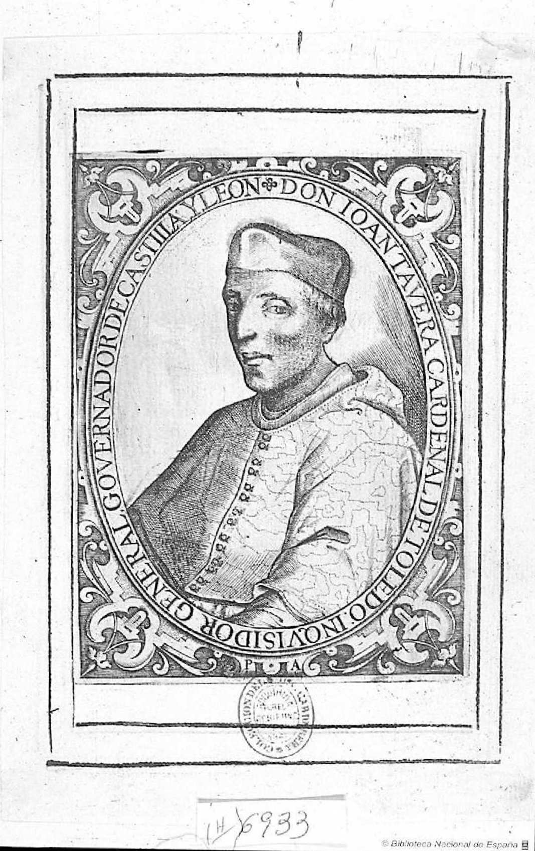 Retrato de Juan Pardo de Tavera, incorporado al Chronico de el Cardenal don Iuan Tauera de Pedro de Salazar y Mendoza, Toledo, 1603. Biblioteca Nacional de España